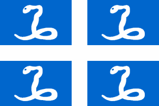 Antigua Bandera de Martinica